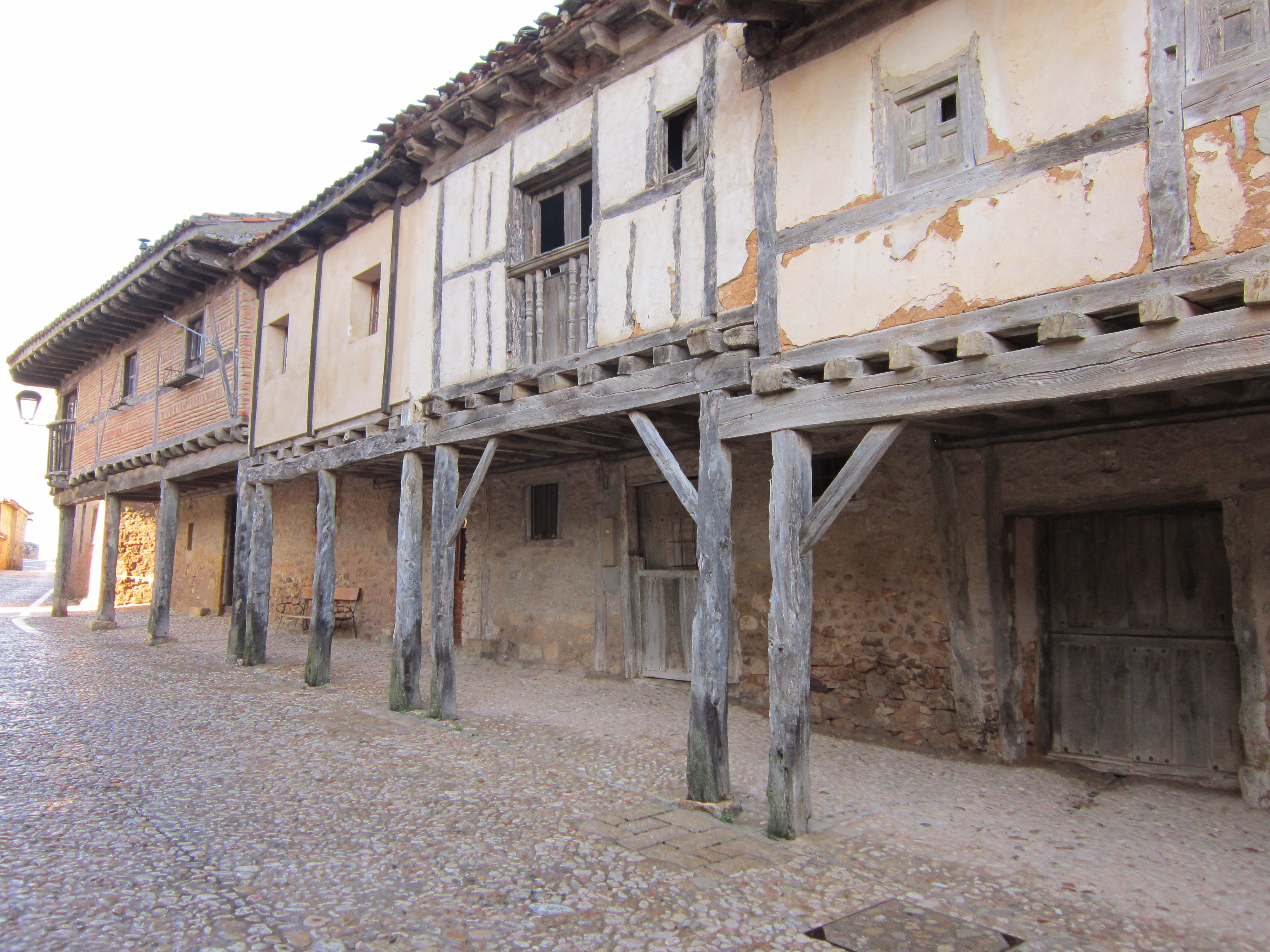 Arquitectura popular